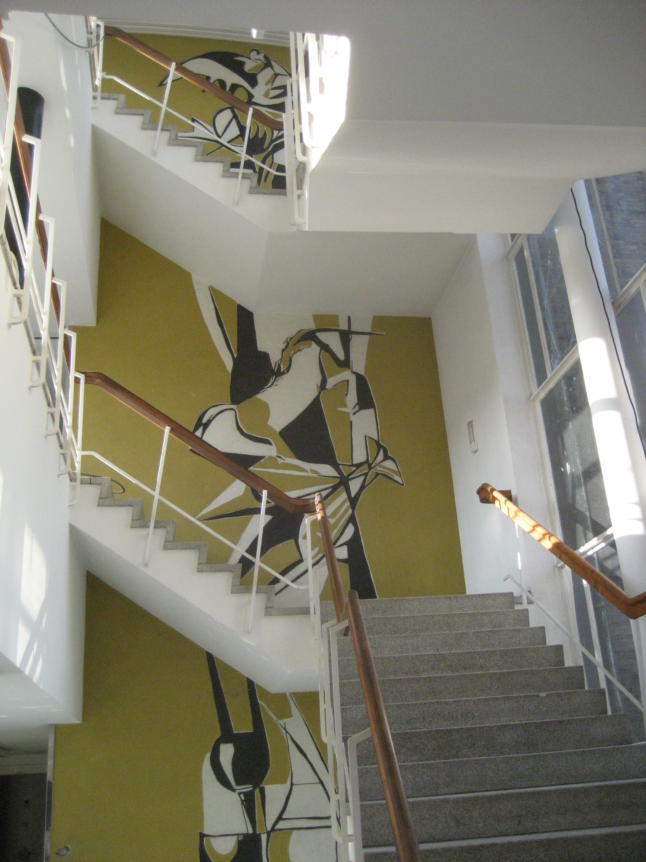 Sgraffito door Lex Horn (Compostie van elementen uit de alchemie) in Clusiusgebouw, Wassenaarseweg 64, Leiden, Nederland. Aangebracht 1959, verwijderd en elders in Leiden opgeslagen in mei 2015